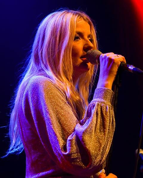 Suzie Kerstgens (Klee) in der Zeche Carl, Essen